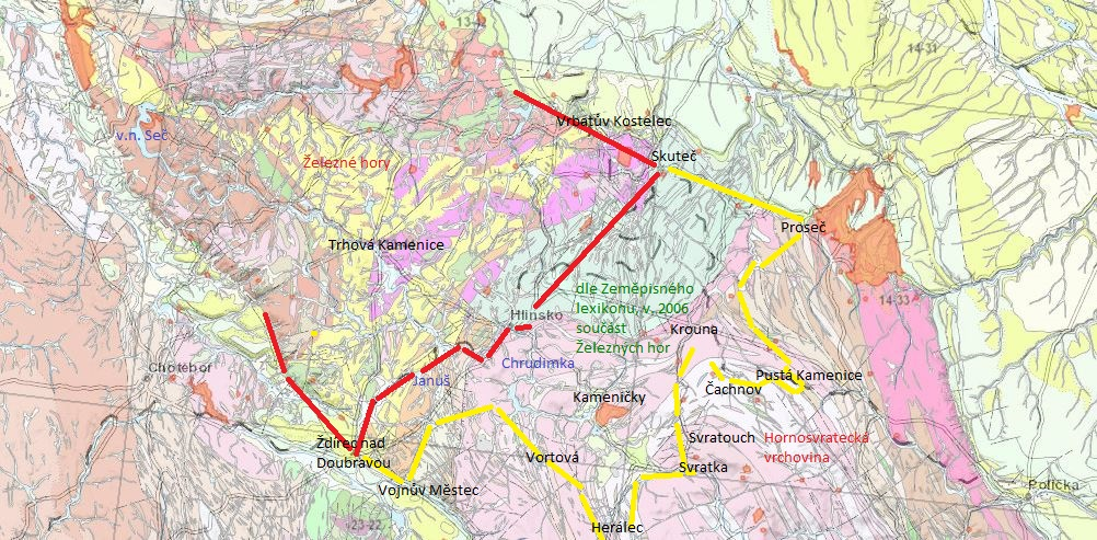 Rozhraní geomorfologického celku Železné hory a sousedních geomorfologických celků, od severu: Svitavská pahorkatina - Hornosvratecká vrchovina - Hornosázavská pahorkatina. Hranice geomorfologických celků vyznačených v hrubých obrysech na podkladu geologické mapy 1:50000 České geologické služby (dostupná on-line). Červeně zhruba na linii uváděné některými autory jako hranice Železných hor s Hornosvrateckou vrchovinou podle geologických map (též Jindřich Vodička, Železné hory očima geologa : od severu z Vrbatová Kostelce ve směru Skuteč - Hlinsko - ohyb řeky Chrudimky na k.ú. Hlinska - Barchanecký potok - rybník Januš - Barchanecký potok - Ždírec nad Doubravou). Žlutě je uvedena přibližná hranice, z hlediska geomorfologie, publikovaná Zeměpisným lexikonem ČR: Hory a nížiny, vydaným Agenturou ochrany přírody a krajiny České republiky v roce 2006 v Brně, editoři Jaromír Demek a Peter Mackovčin, spoluautoři Břetislav Balatka a kolektiv (od severu ze Skutče ve směru Proseč - Rychnov (m.č. Krouny) - Pustá Kamenice - Čachnov - silnice č. 354 nad Krounou - sedlo mezi vrchy U oběšeného a Otava na k.ú. Svratouch - řeka Svratka na k.ú. Svratka - podél řeky Svratky do Herálce - Vortová - silniční spojka pod Suchým vrchem - Vojnův Městec - Ždírec nad Doubravou). Poznámka: Nákres s popisky na podkladu geologické mapy 1:50000 České geologické služby. Errata: v názvu souboru je chybně označen geomorfologický celek, správně má být Hornosvratecká vrchovina nebo Hornosázavská pahorkatina.